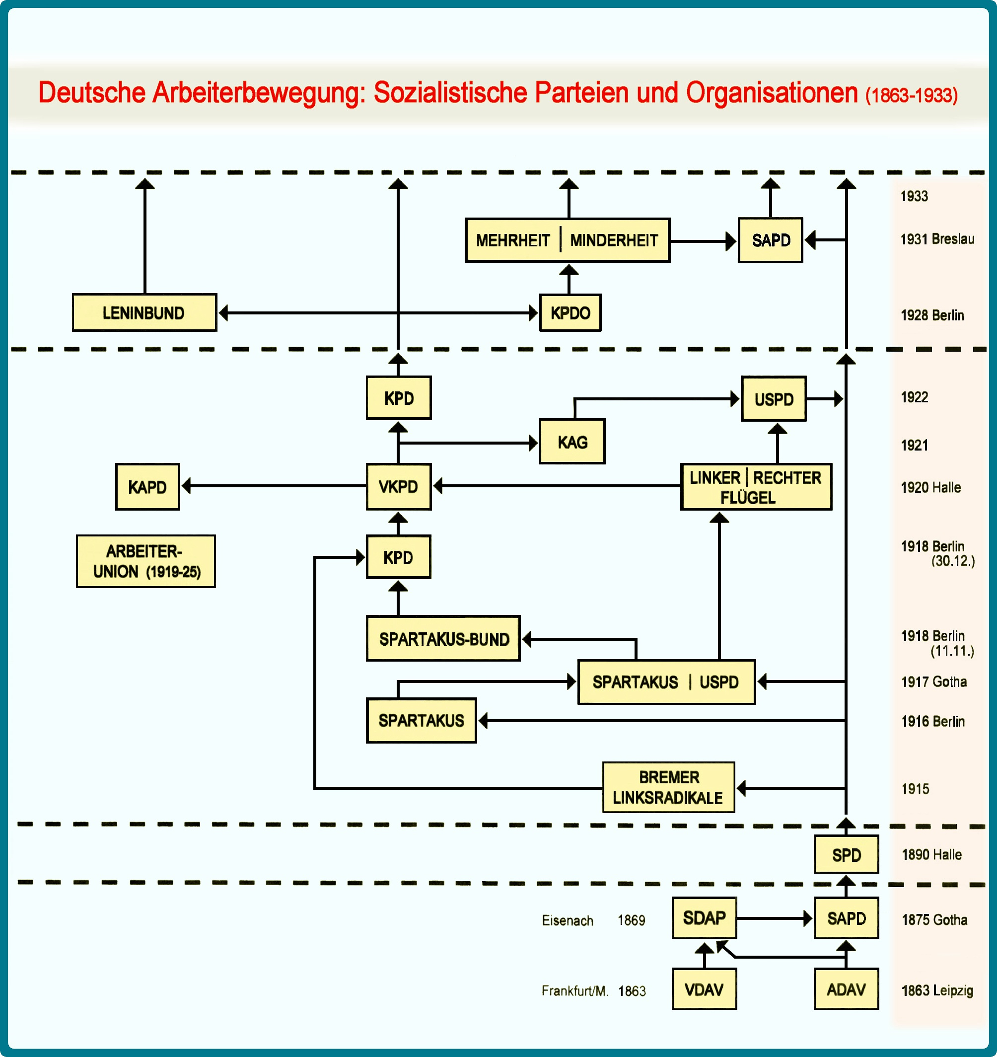 Sozialistische Parteien und Organisationen (1863-1933) der Arbeiterbewegung in Deutschland